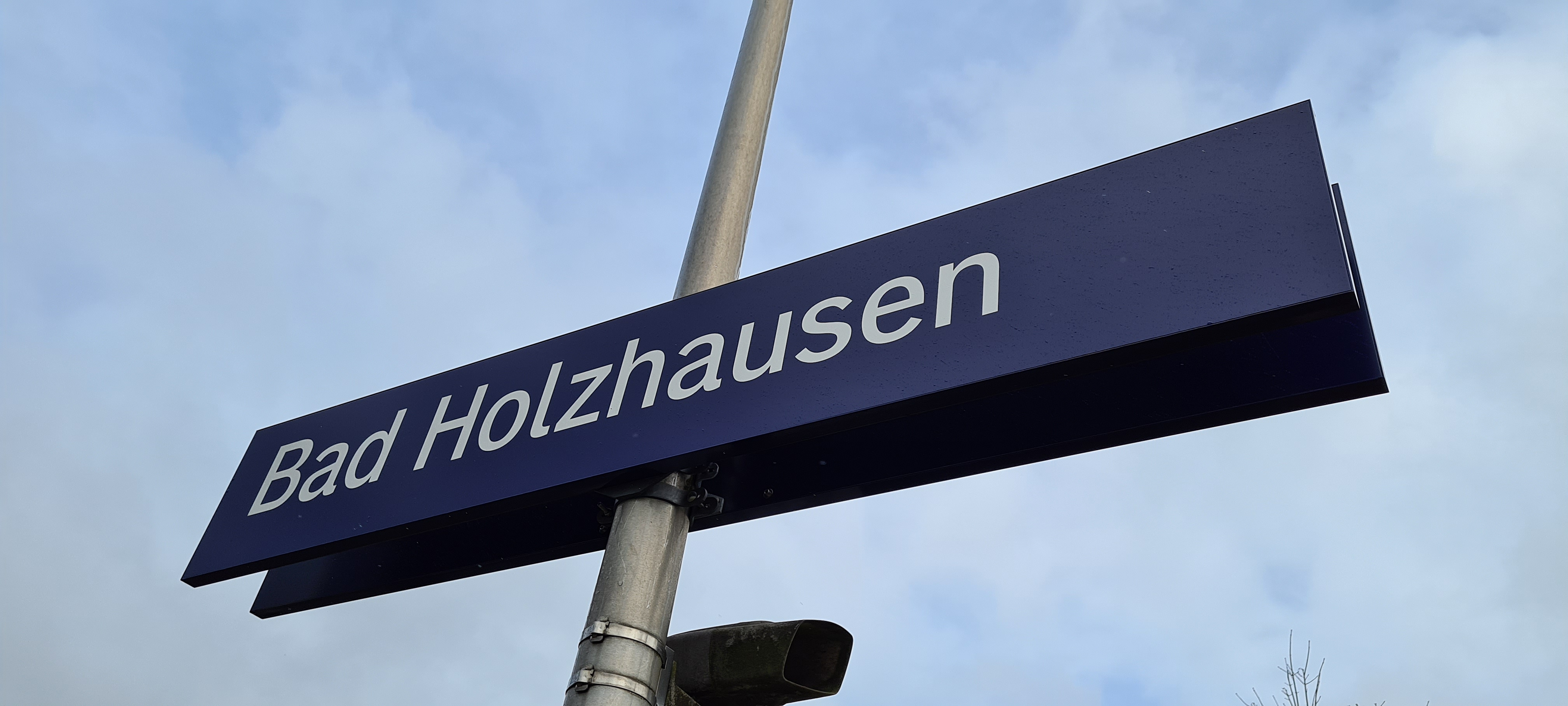 Bahnhofsschild Bad Holzhausen, Der Bahnhof Holzhausen-Heddinghausen wurde zum Fahrplanwechsel am 15. Dezember 2019 in Bad Holzhausen umbenannt. Der Bahnhof ist zurzeit der größte, im Linienverkehr genutzte Bahnhof der Stadt Preußisch Oldendorf. Der Bahnhof in der Innenstadt wird nur noch für Museumsverkehr genutzt. Taken on 13 March 2020